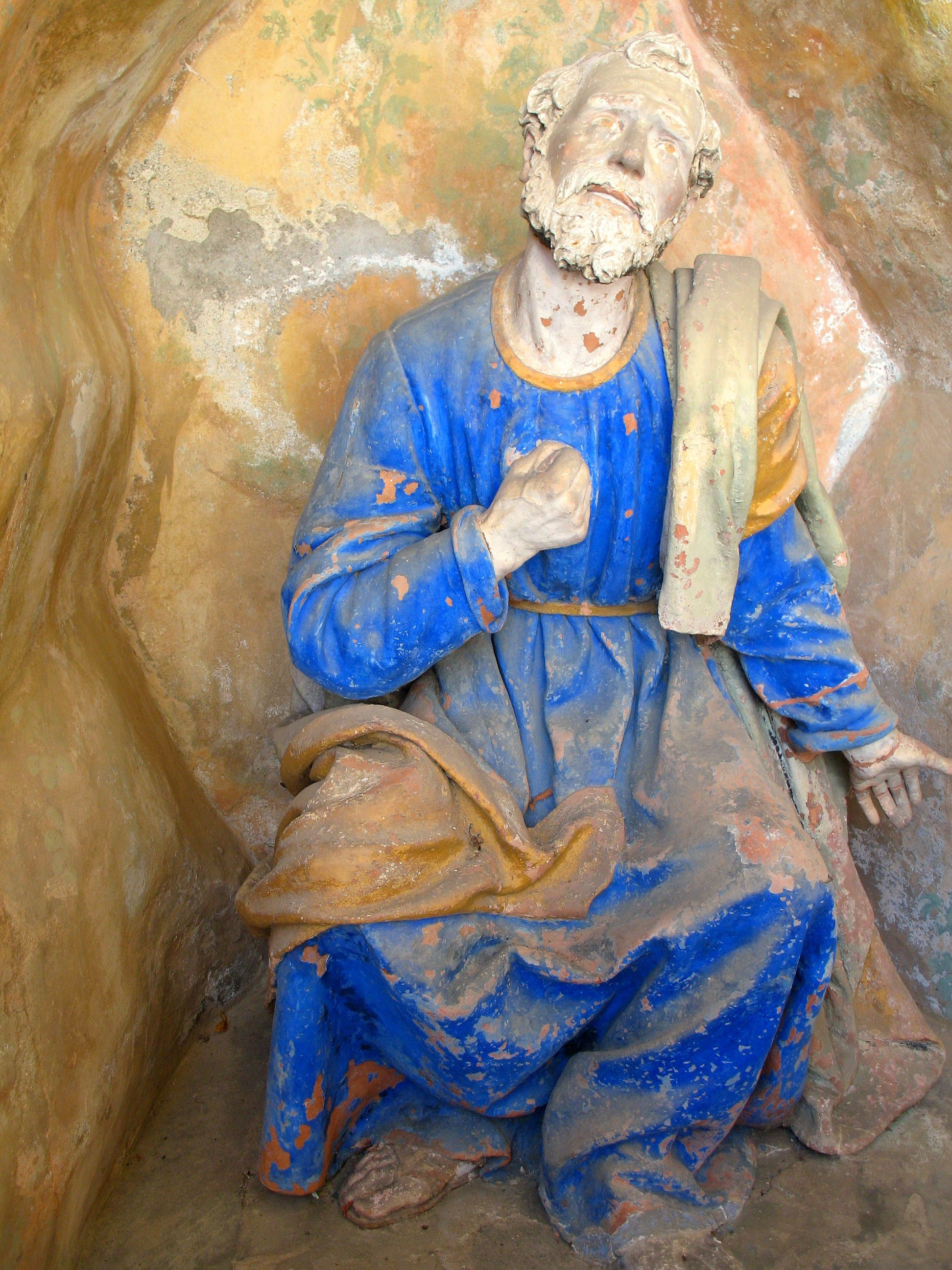 Sacro Monte di Varallo: Cappella XXVI, "Il pentimento di san Pietro" - San Pietro. Statue di Giovanni d'Enrico (1638-1639). (Nota: immagine elaborata nella colorazione e nel contrasto)